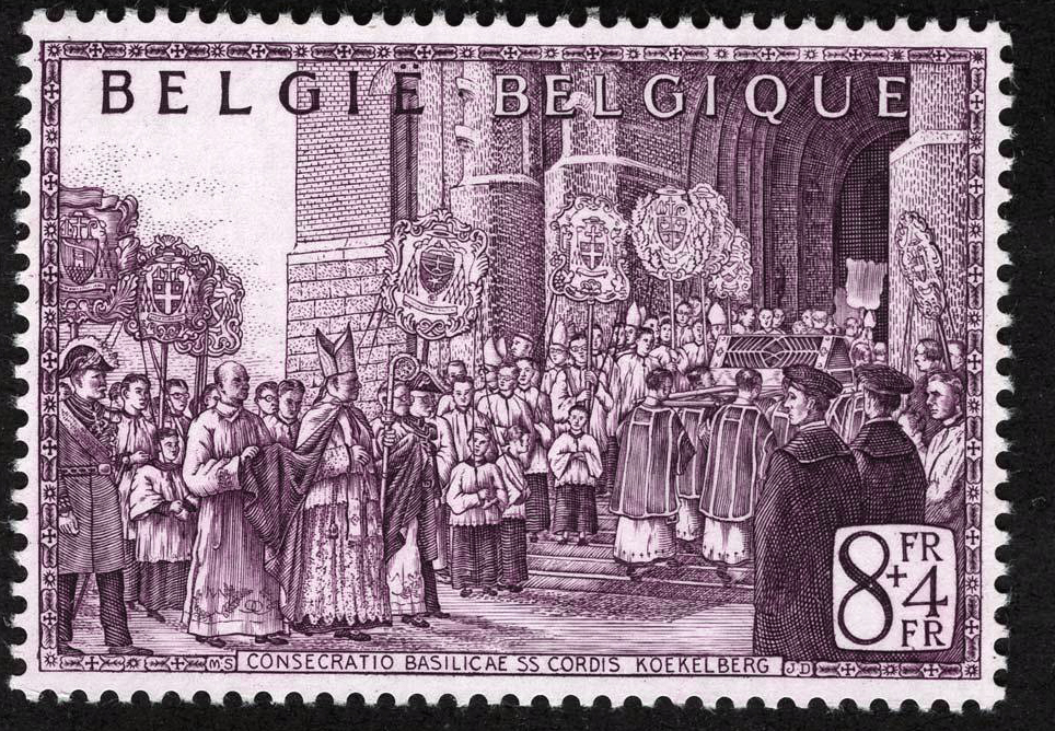 De zegel stelt het binnendragen voor door priesters van het Heilig-Hartcollege (Ganshoren) van de relikwieën van de Sint Albertus van Leuven, gevolgd door kardinaal Van Roey. De omstaanders en volgelingen zijn o.a. de Belgische bisschoppen en gemijterde abten vergezeld door knapen die hun wapenschild dragen. E.H. Bernard Vanden Berghe, pastoor van de Basiliek houdt de rechterzijde van de mantel vast. De zegel werd uitgegeven ter gelegenheid van de 25e verjaardag van het kardinaalschap van J.E. Van Roey (K.B. 21 Feb. 1952).